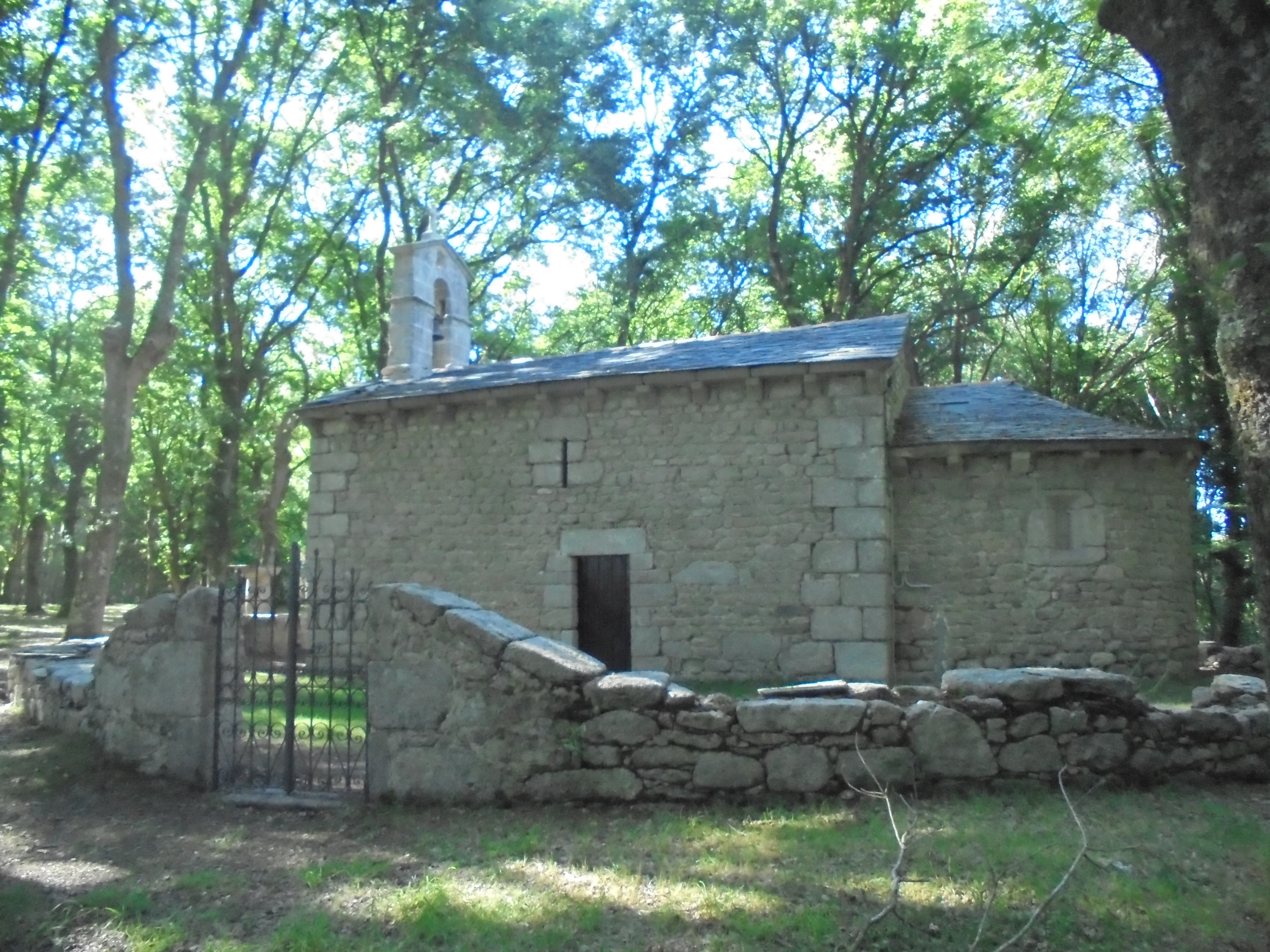 Capela de Castrillón ( O Corgo)